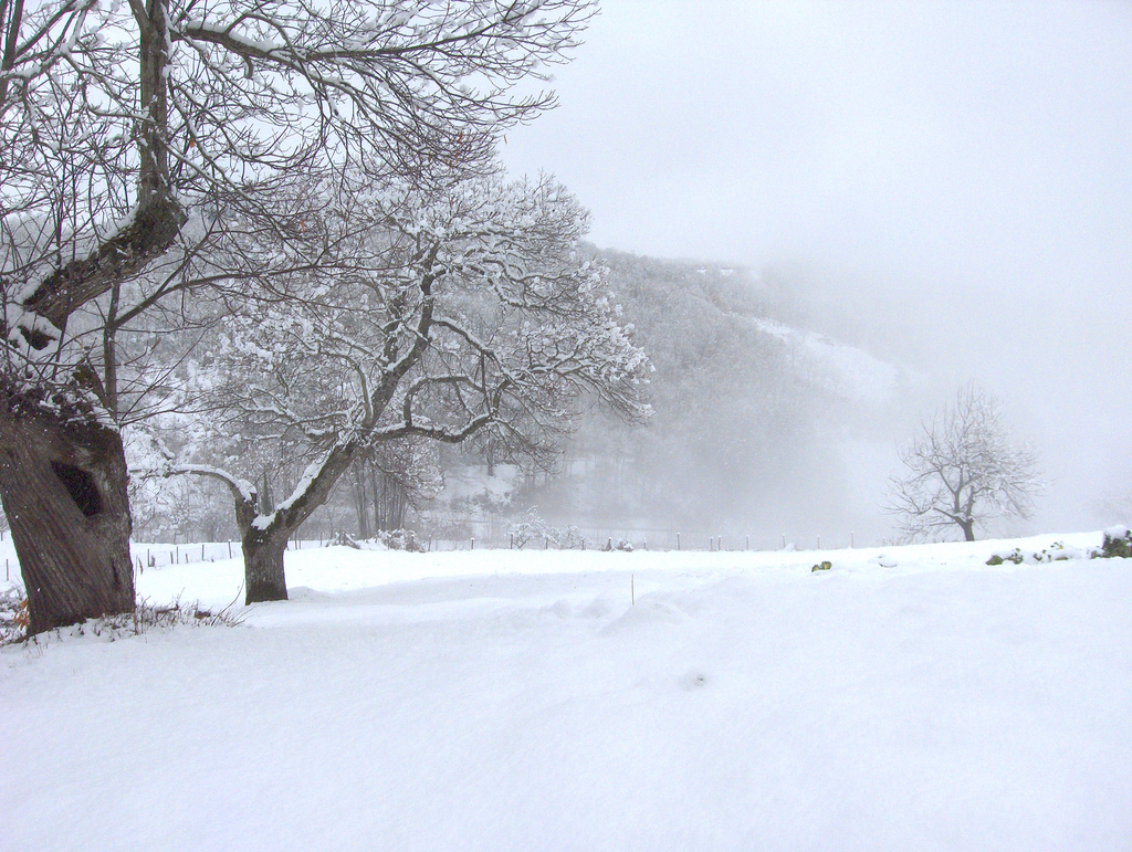 Lagarelhos , Vinhais - Portugal